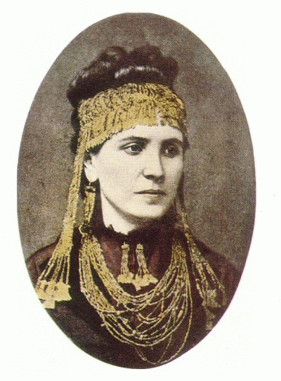 Porträt von Sophia Schliemann mit dem Grossen Gehänge aus dem "Schatz des Priamos"